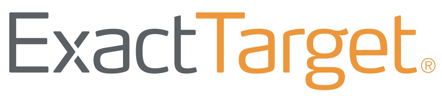 ExactTarget logo